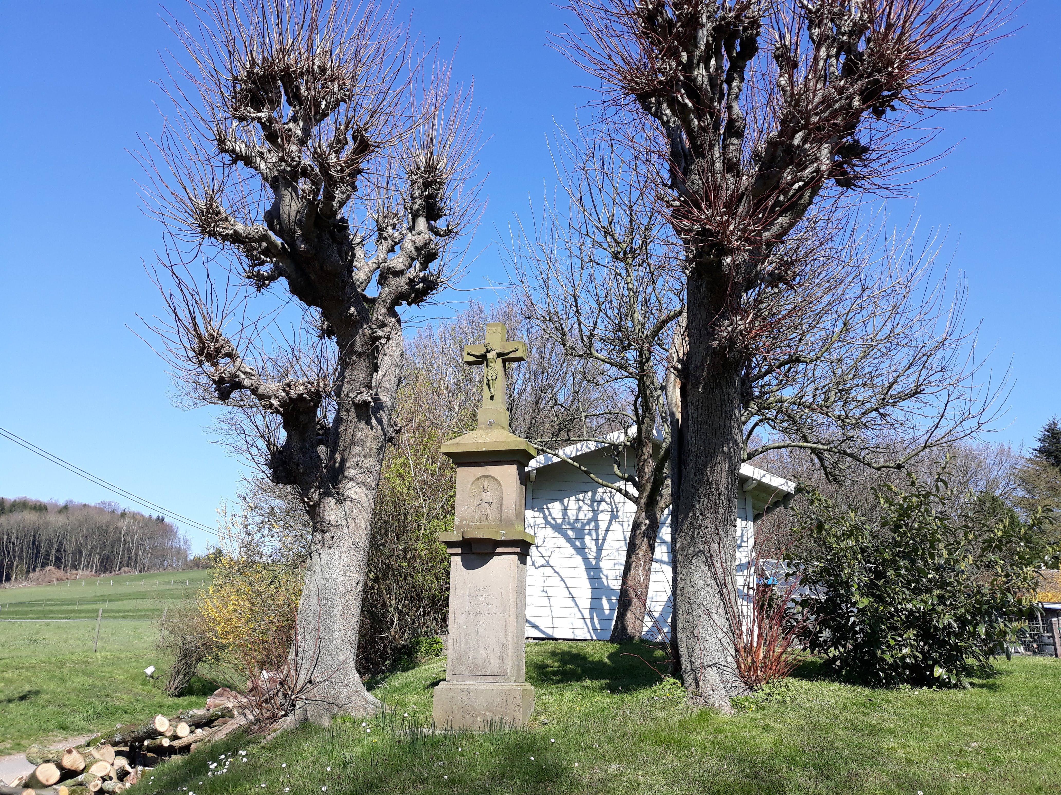 Meiswinkel (Kürten)